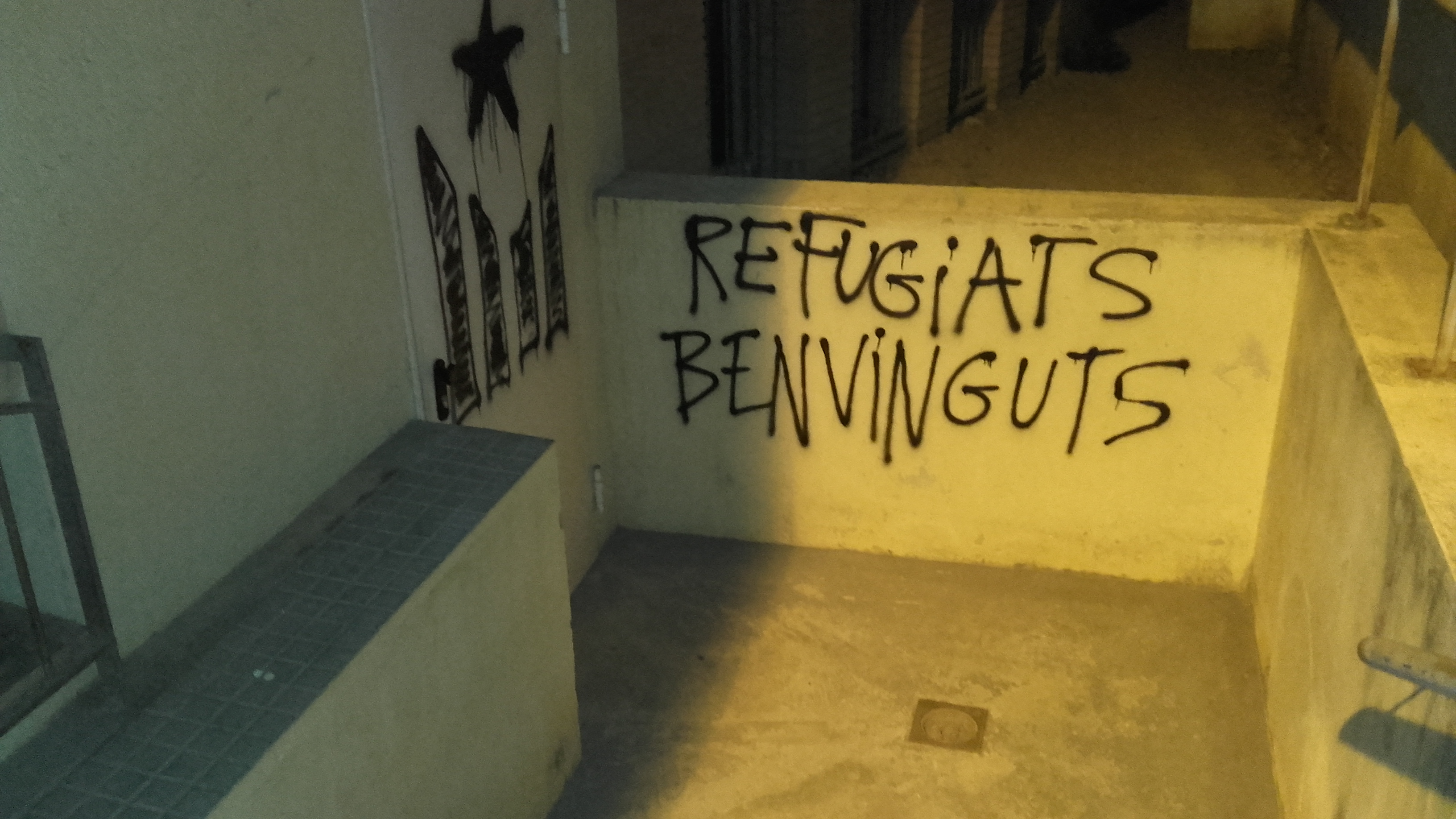 Crítica amb les polítiques oficials que ens governen.